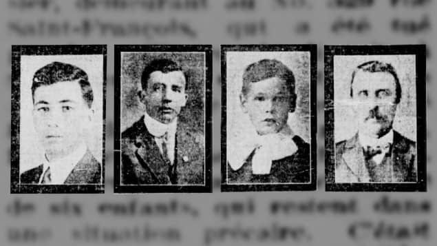 Alexandre Bussières, Joseph-Édouard Tremblay, Honoré Bergeron et Georges Demeule sont les quatre victimes de l'émeute du Printemps 1918 à Québec